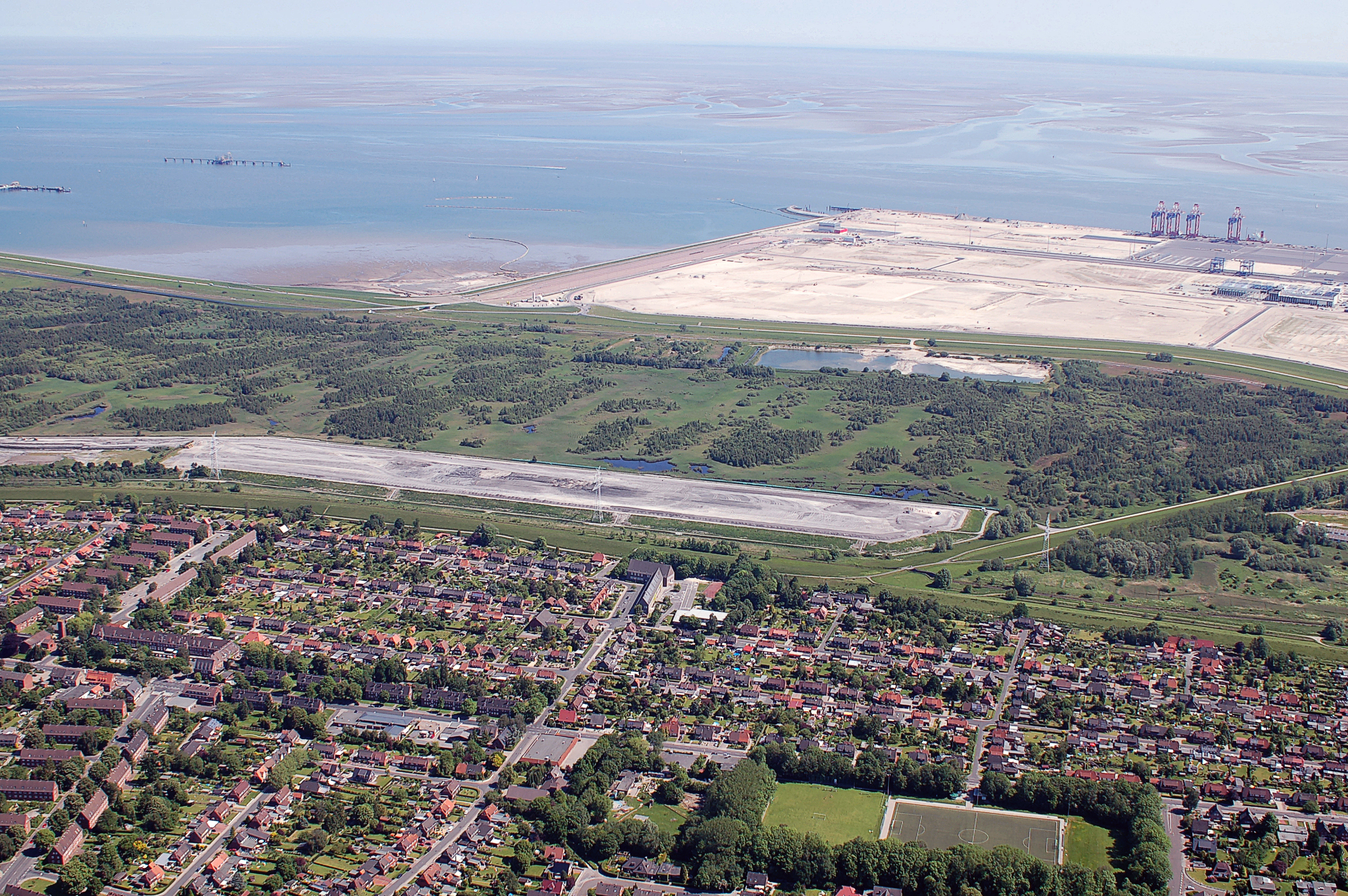 Luftbilder von der Nordseeküste 2012-05 – Im Vordergrund der Stadtteil Voslapp, hinter der Deponie dann das Naturschutzgebiet, dahinter der JadeWeserPort.